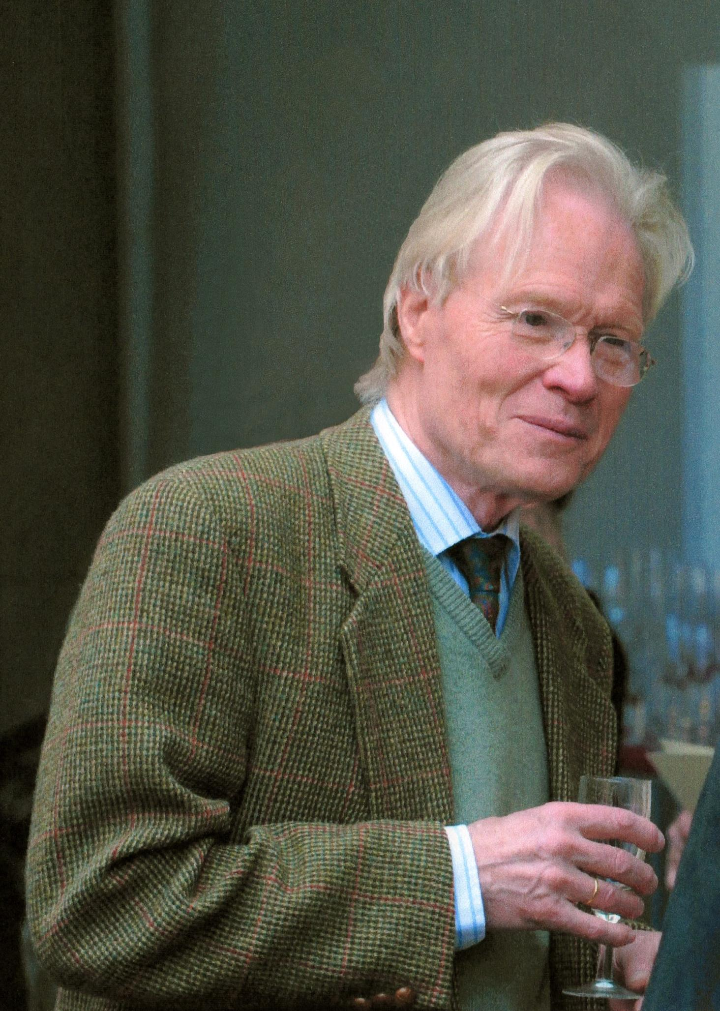 Aktuelles Foto von Detlef Liebs (Dezember 2011)